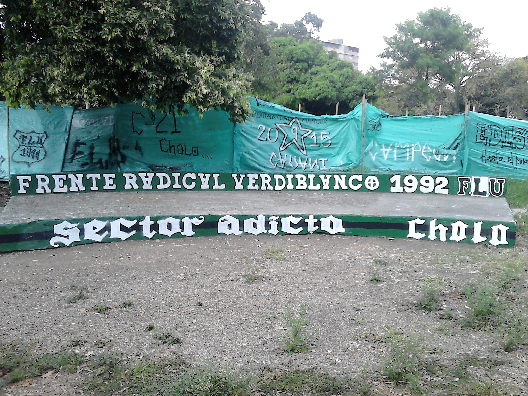 Parque de la Música en Cali. gradas pintadas por el Frente Radical Verdiblanco Esta fotografía fue tomada en el municipio colombiano con código 76001.